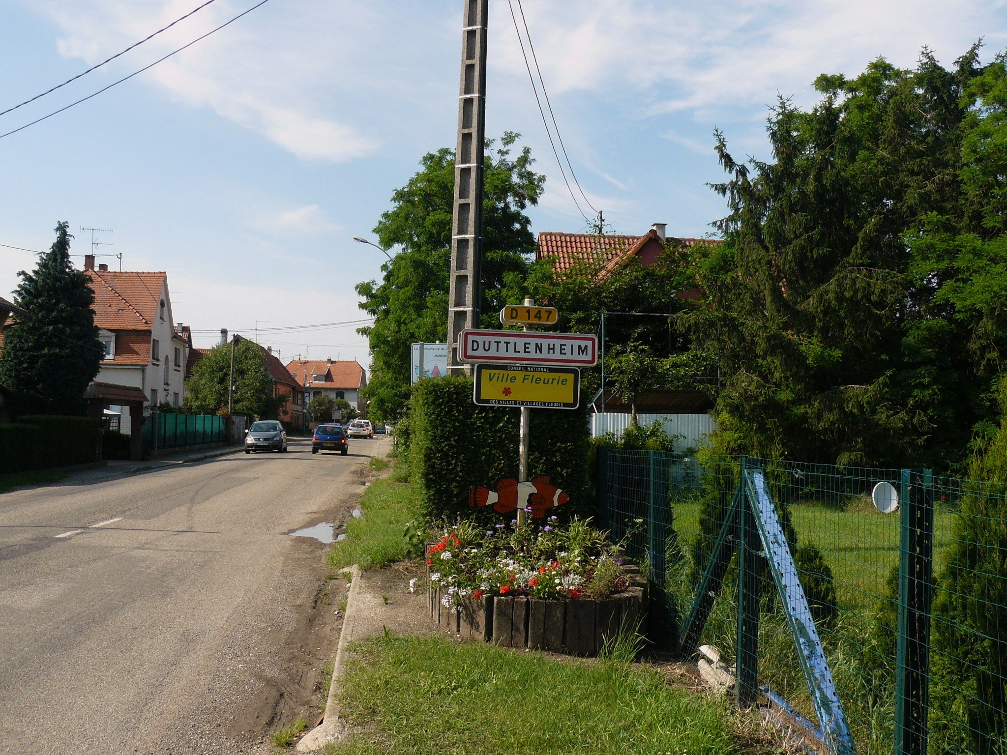 Entrée du village de Duttlenheim